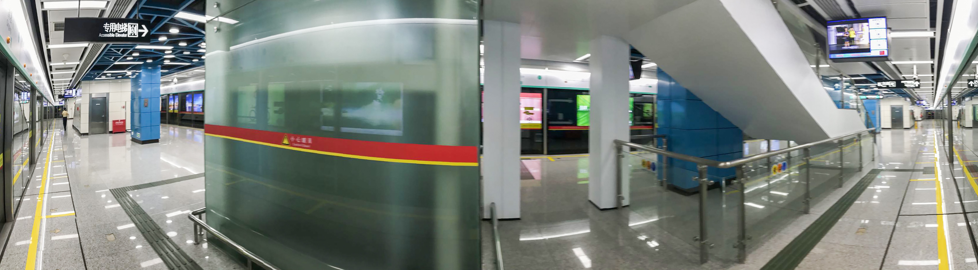 广州地铁清塘站